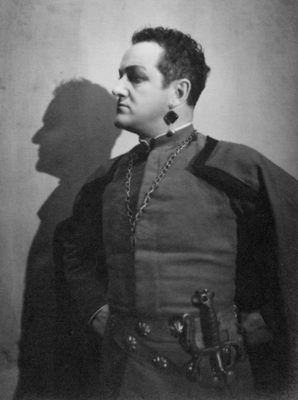 Otto Landahl i Othello på Helsingborgs stadsteater.